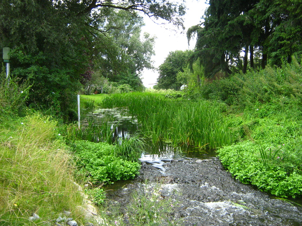 Die Elde in Wredenhagen (Landkreis Mecklenburgische Seenplatte, Mecklenburg).